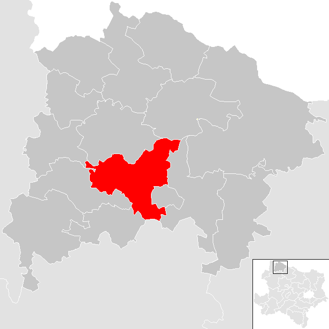 Bezirk Waidhofen an der Thaya